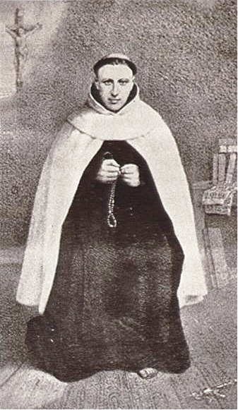 Hermann Cohen (1820-1871), jüdischer Konvertit, Karmeliterpater